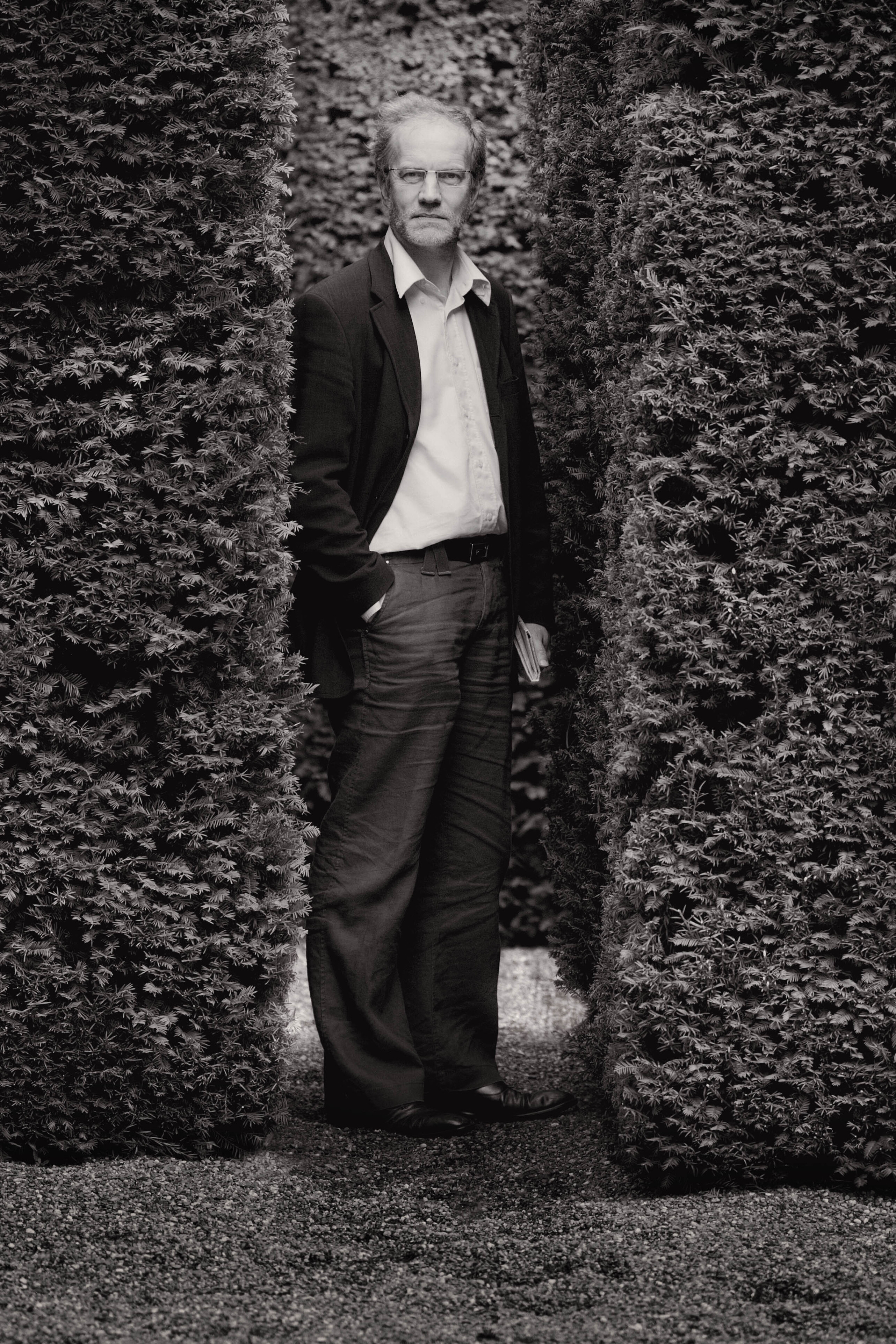 Schrijver en publicist Luc Devoldere